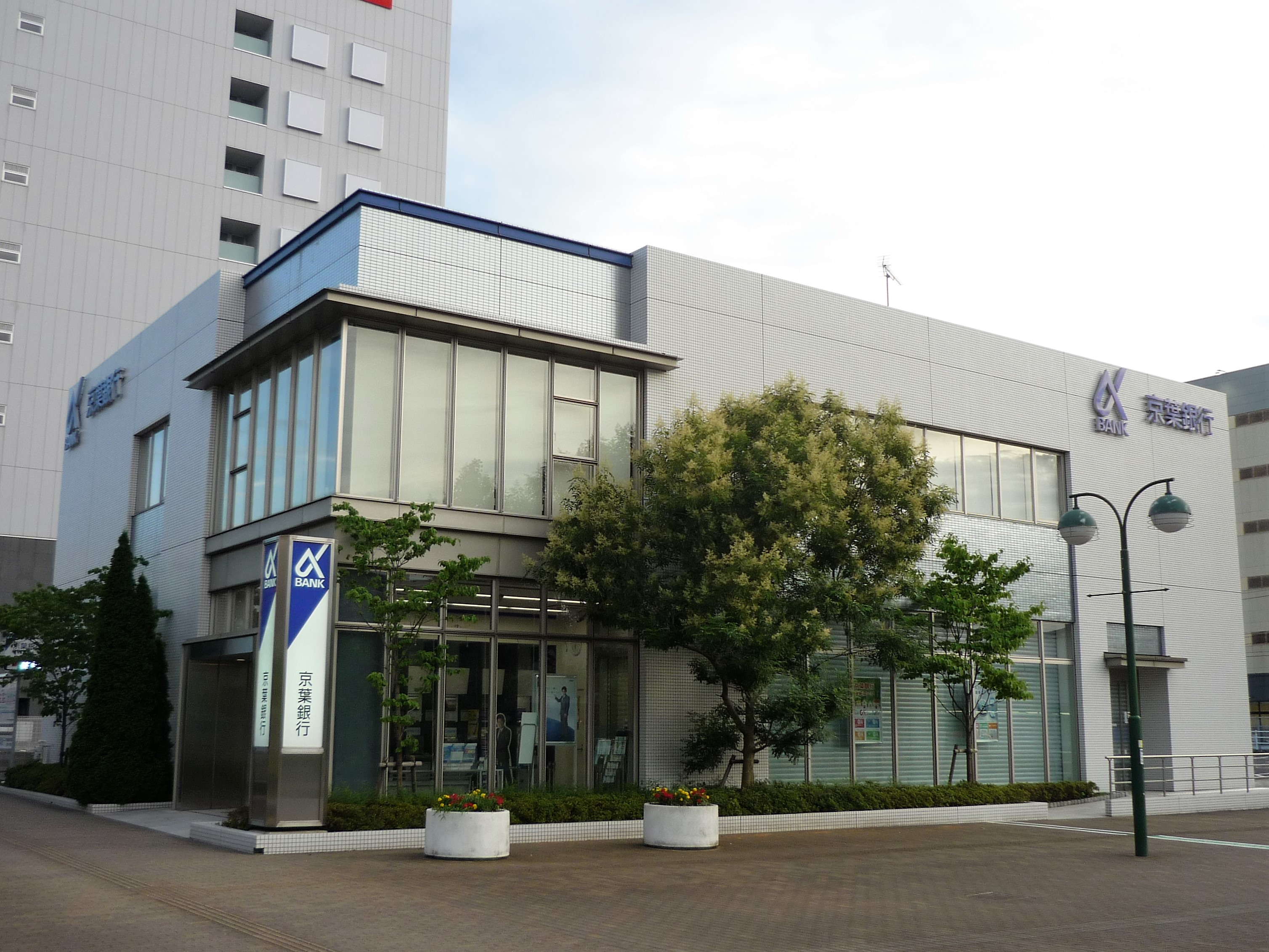 京葉銀行新鎌ヶ谷支店（鎌ヶ谷市新鎌ヶ谷）